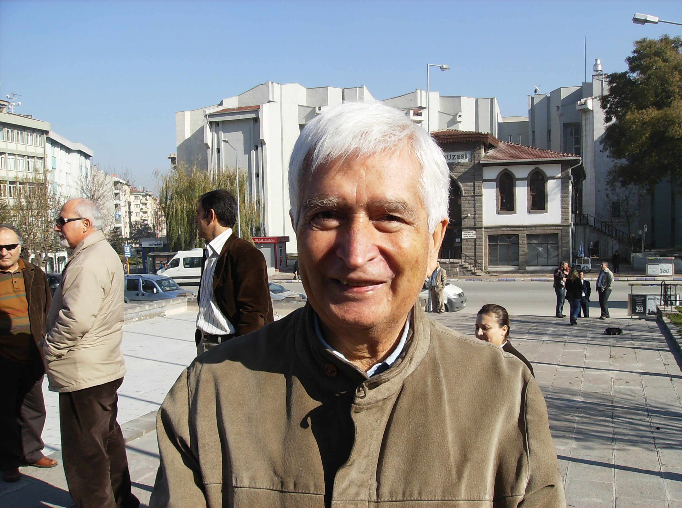 kendi çekimim